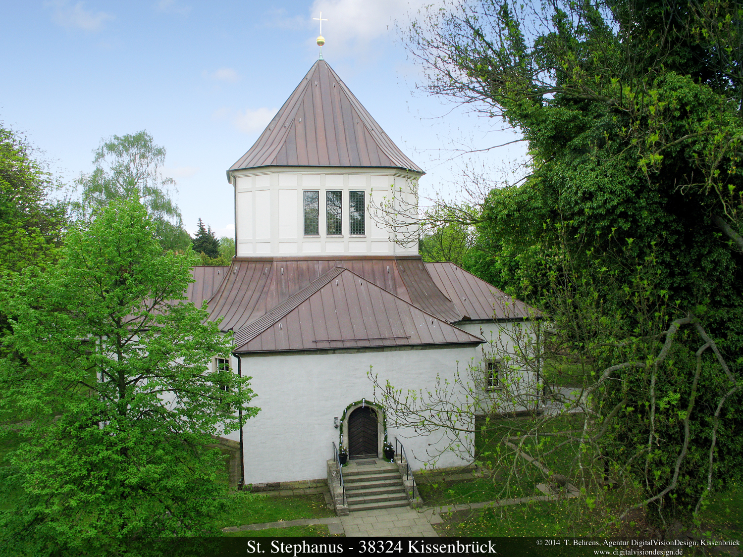 Hochstativfotografie der St. Stephanus Kirche in 38324 Kissenbrück (Landkreis Wolfenbüttel, Niedersachsen. Foto: Dipl.-Designer (FH) Thorsten Behrens, Agentur DigitalVisionDesign